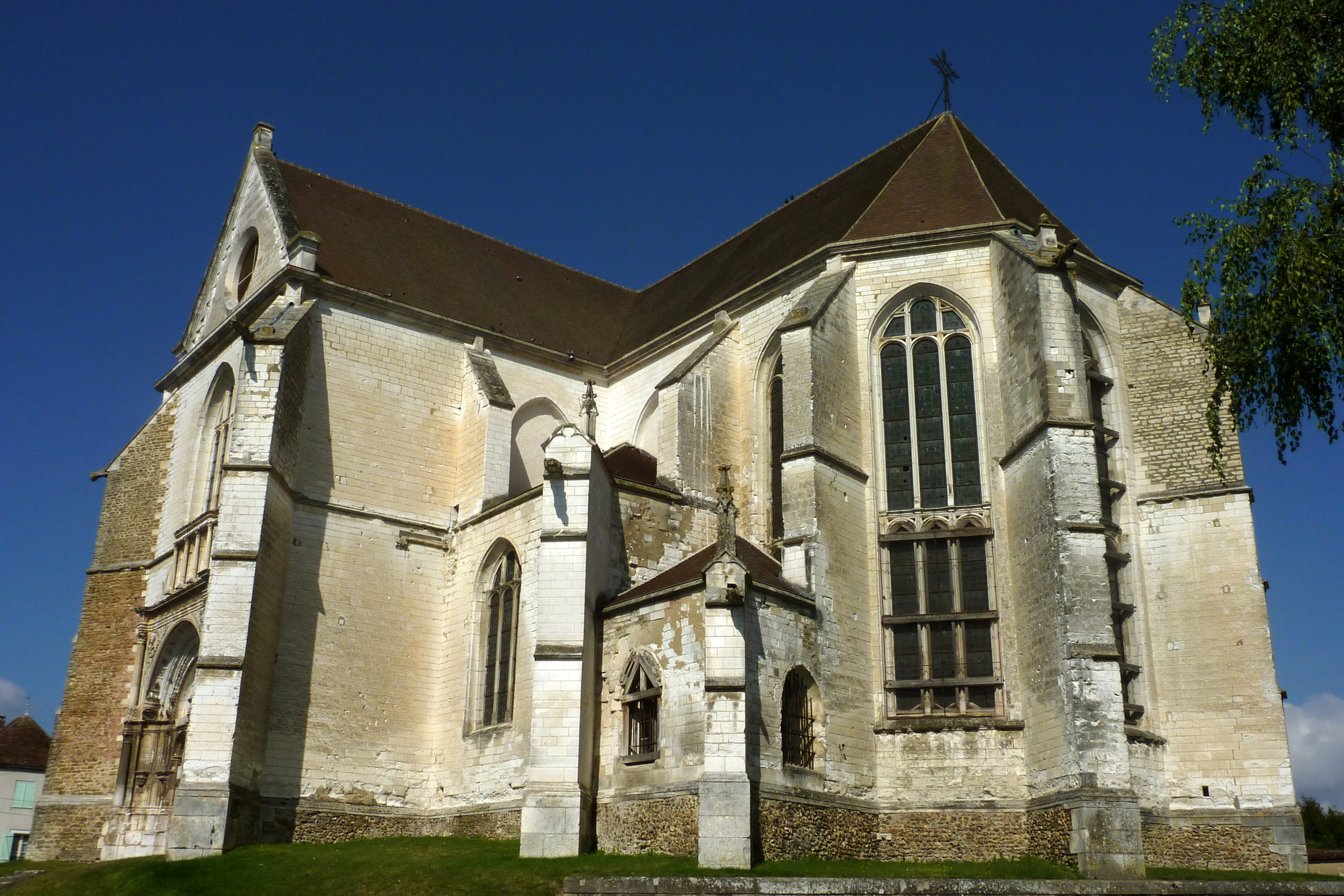 L'église Saint-Symphorien de Neuvy-Sautour